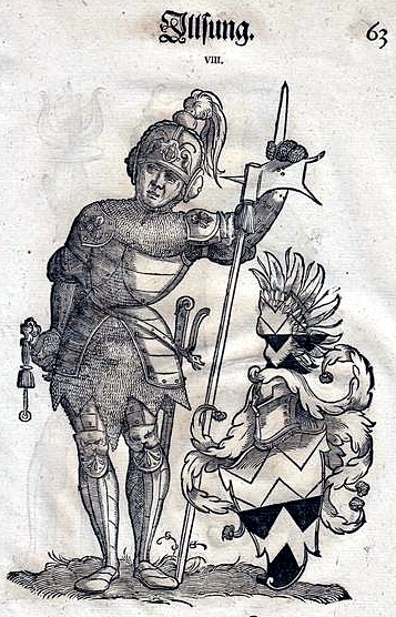 Die Ilsung in: Bericht vnd Antzaigen der loblichen Statt Augspurg aller Herren Geschlecht, so vor fünfhundert vnd mehr Iaren ... daselbst gewont, vnd bis auf achte abgestorben, Christoph Weiditz (+ 1572) 1550